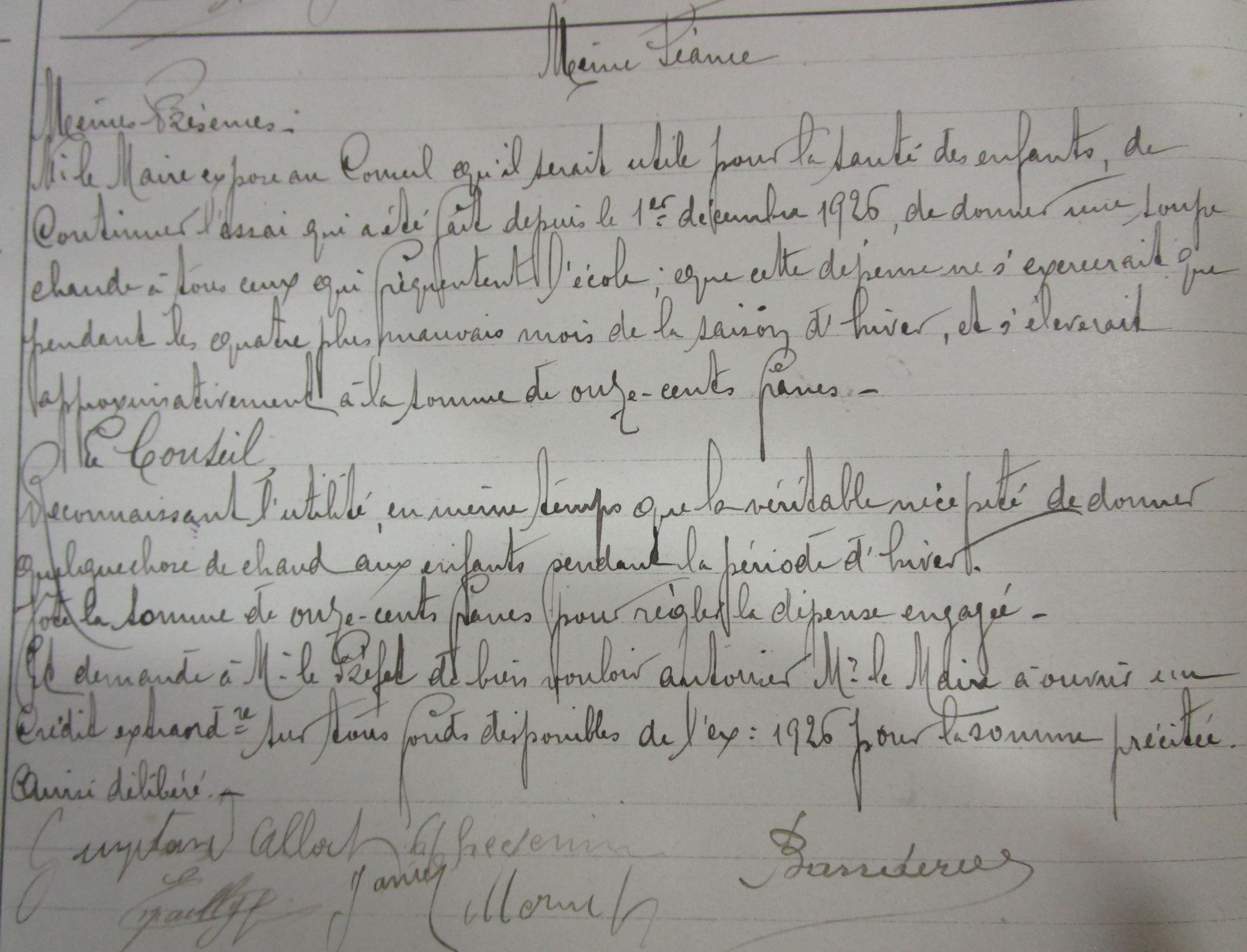 délibérations conseil municipal